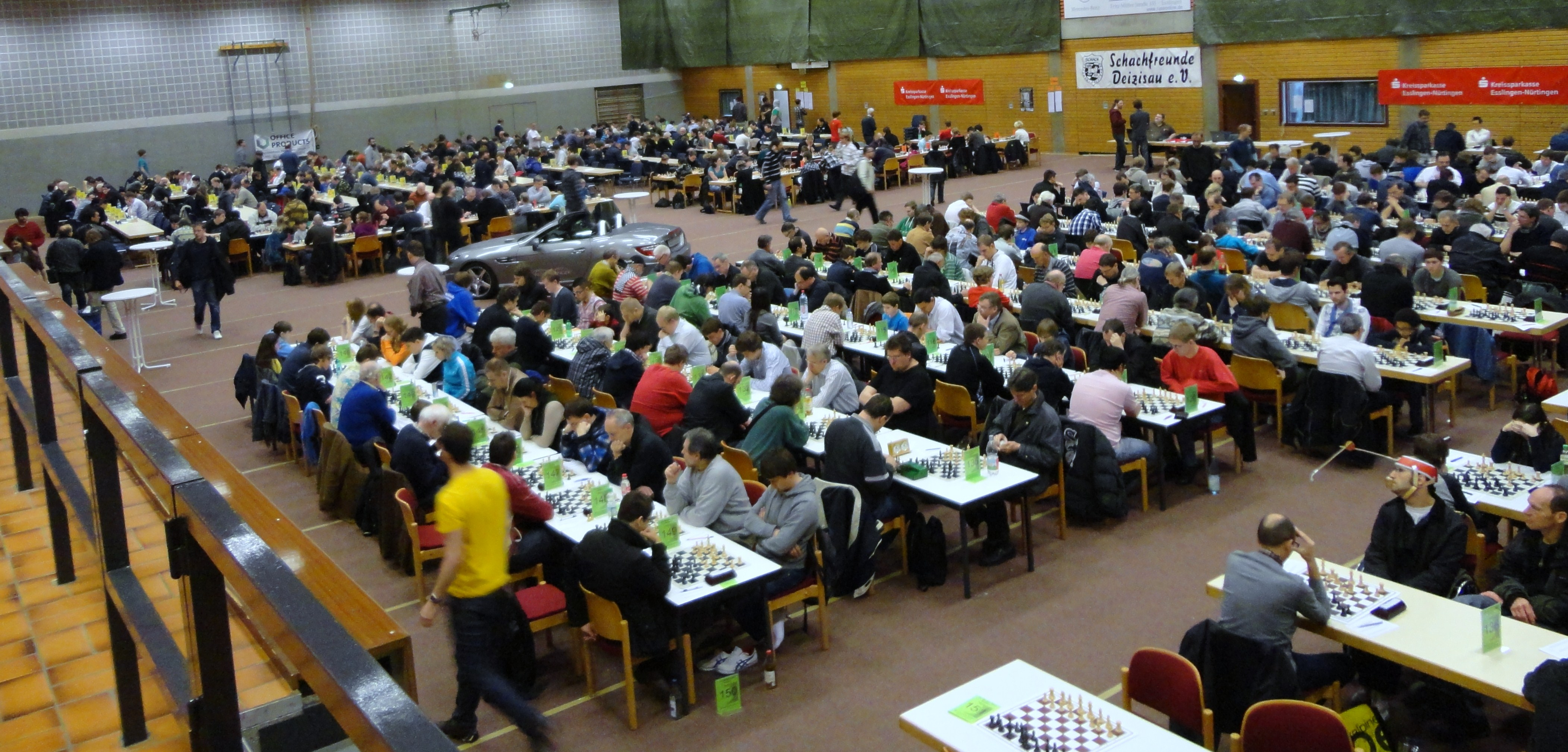 Sporthalle, Internationales Schachturnier Neckar-Open 2012 in Deizisau.